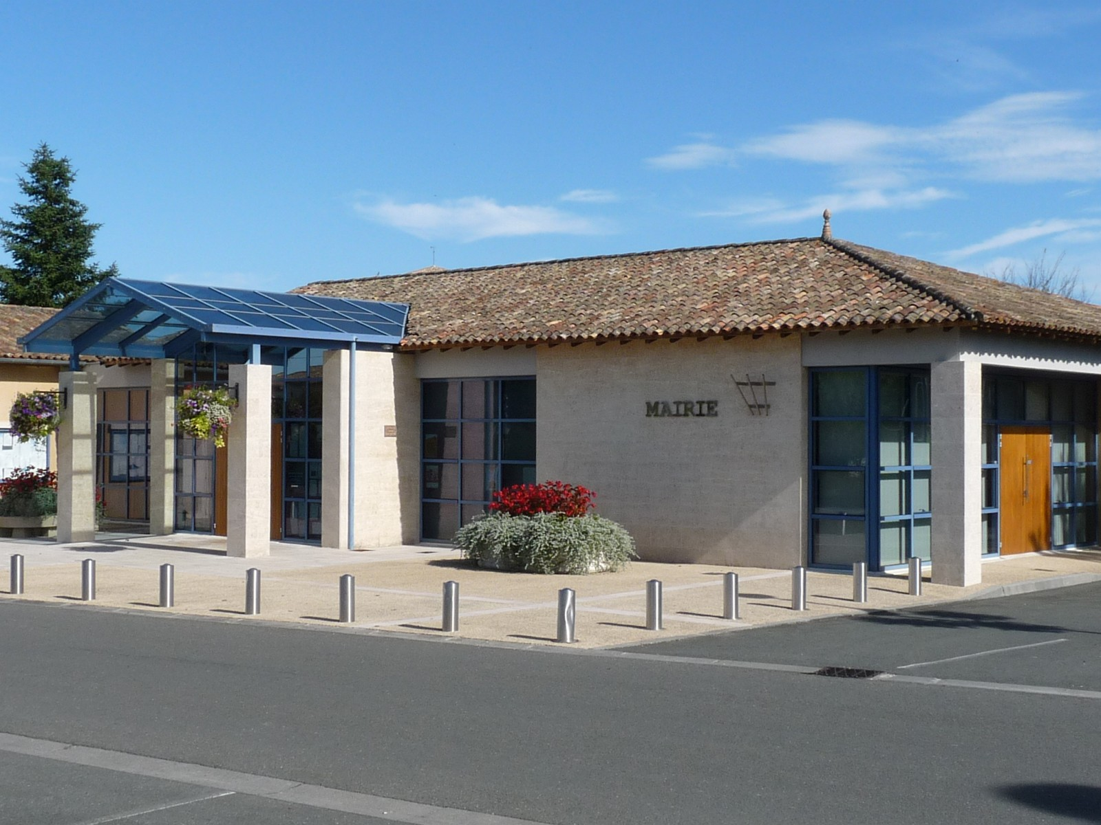 Mairie de Cubnezais, Gironde, France